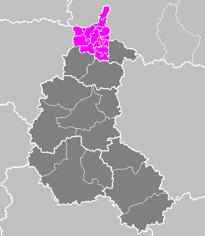 Maps of arrondissements and cantons of France: Arrondissement de Charleville-Mézières - Canton de Charleville-La Houillère.PNG